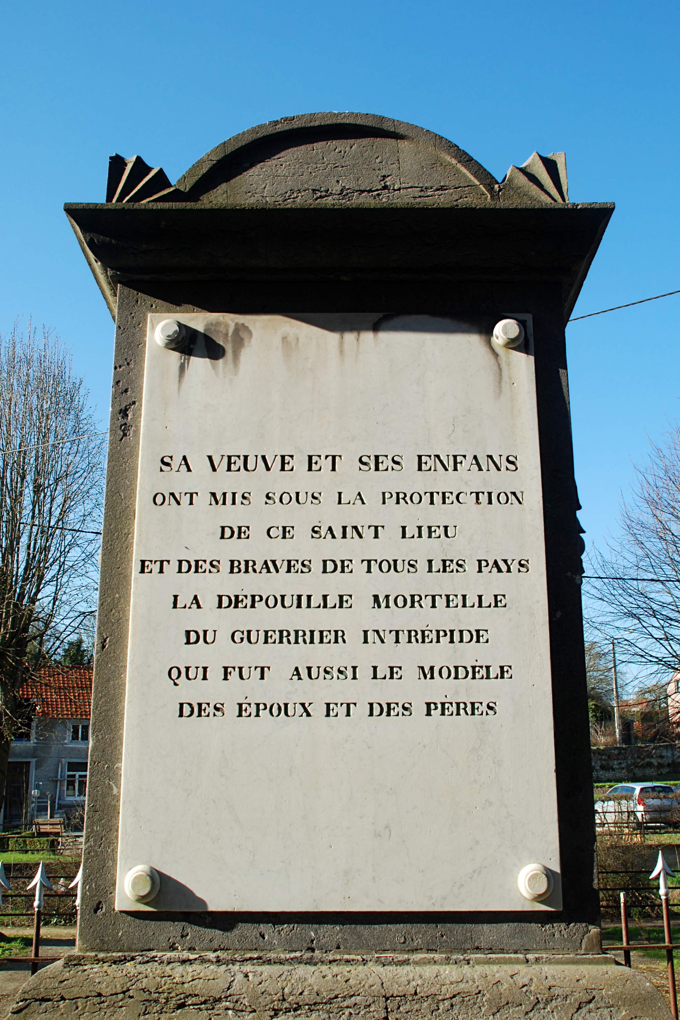 Belgique - Brabant wallon - Genappe - Ways - Mausolée Duhesme (tombe du Général Duhesme, mort des suites des blessures encourues à la bataille de Waterloo)